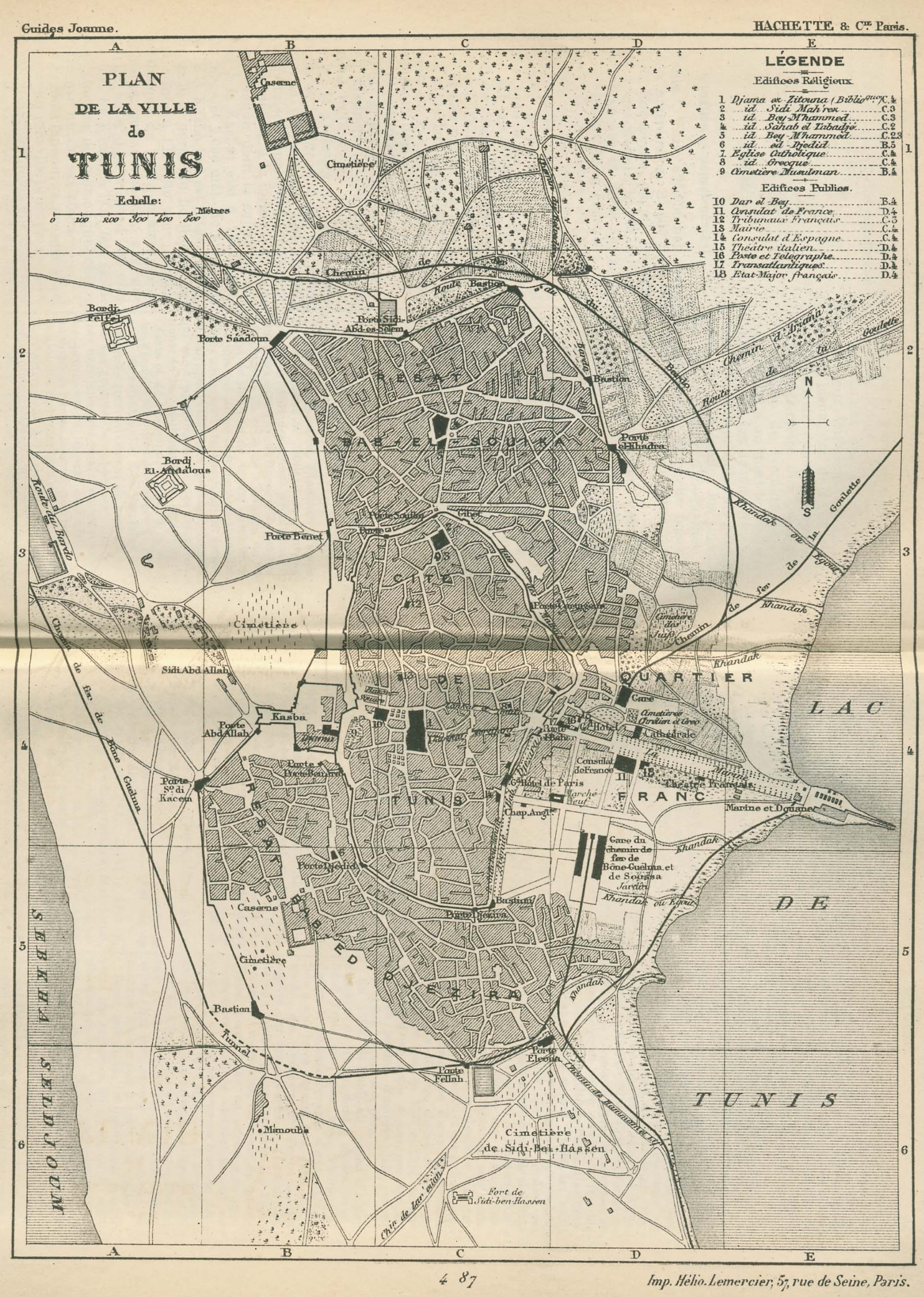 Plan de Tunis en 1888, Tunisie